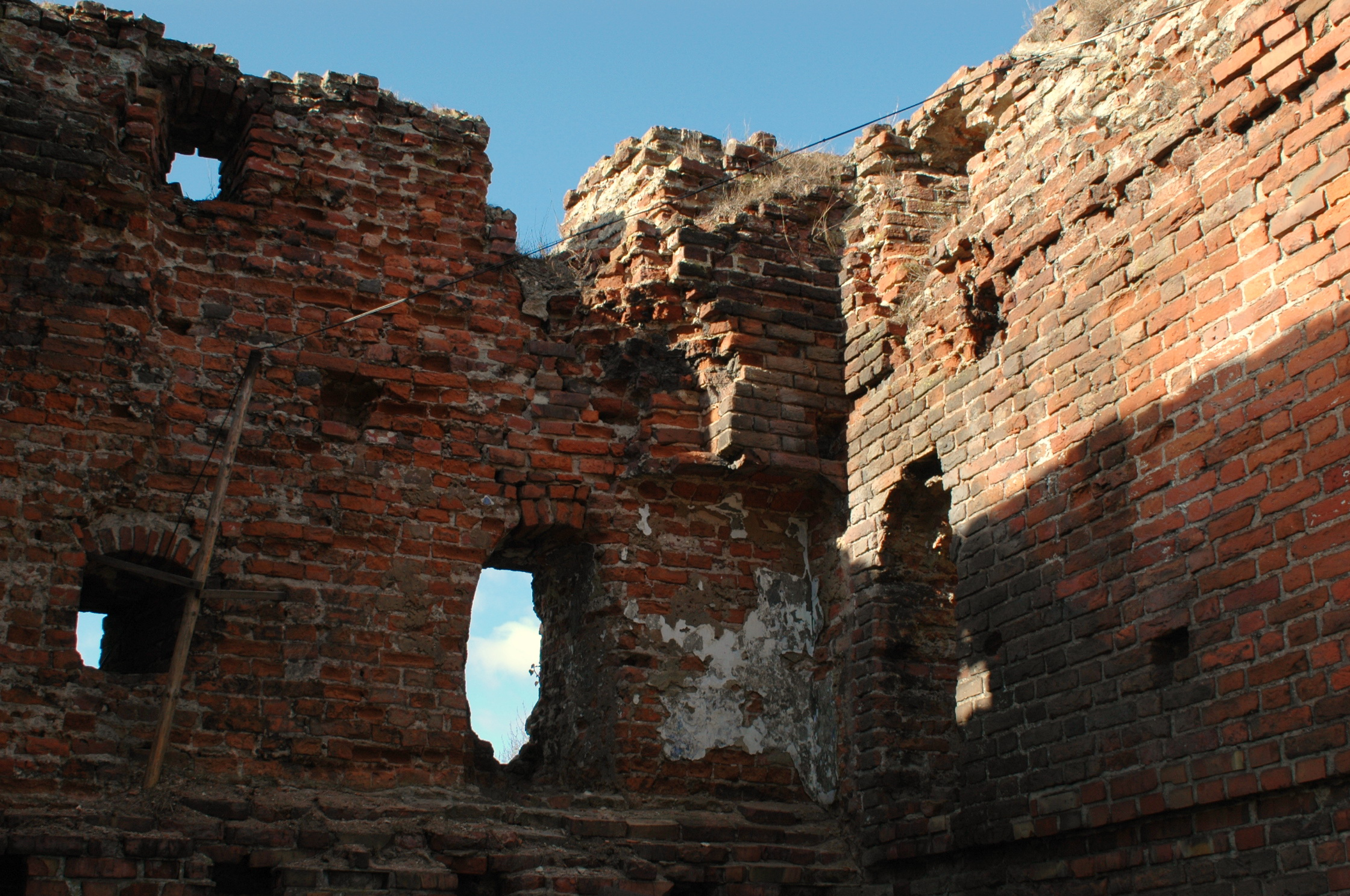 zespół murów miejskich w Debrznie, pow. człuchowski